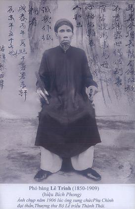 Phó bảng Lê Trinh (1850-1909)